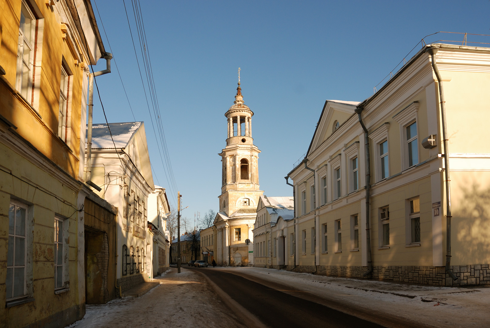 Torzhok, street